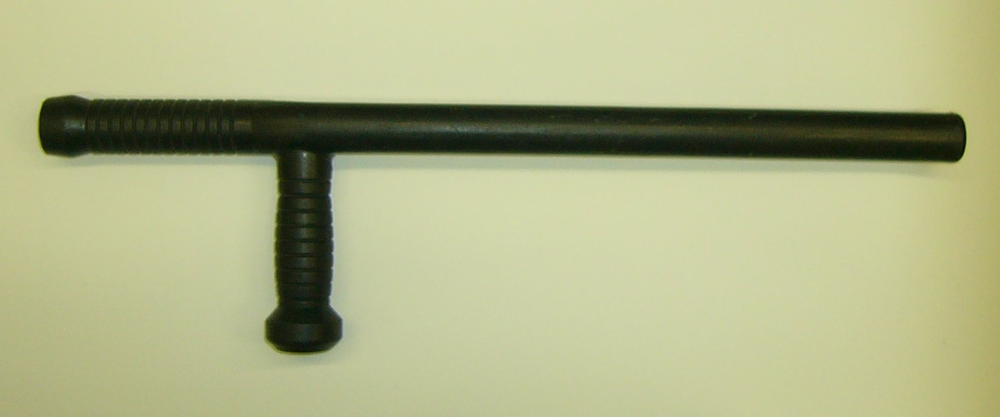 A black rubber bat(on), TONFA (plastic), medium size, used by the German Police.